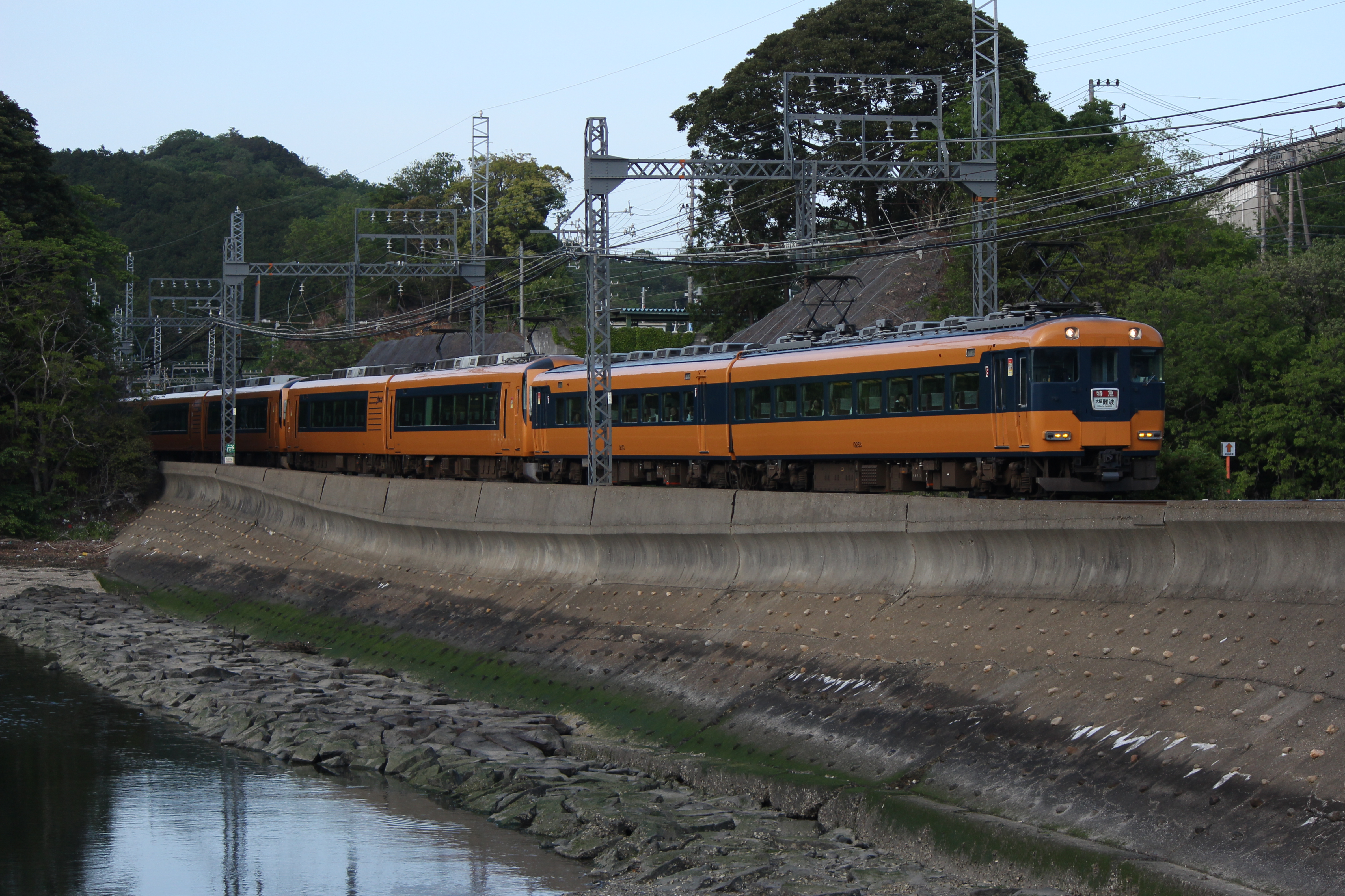 近鉄12200系（N53編成）と22600系6連 鳥羽駅 - 池の浦駅間